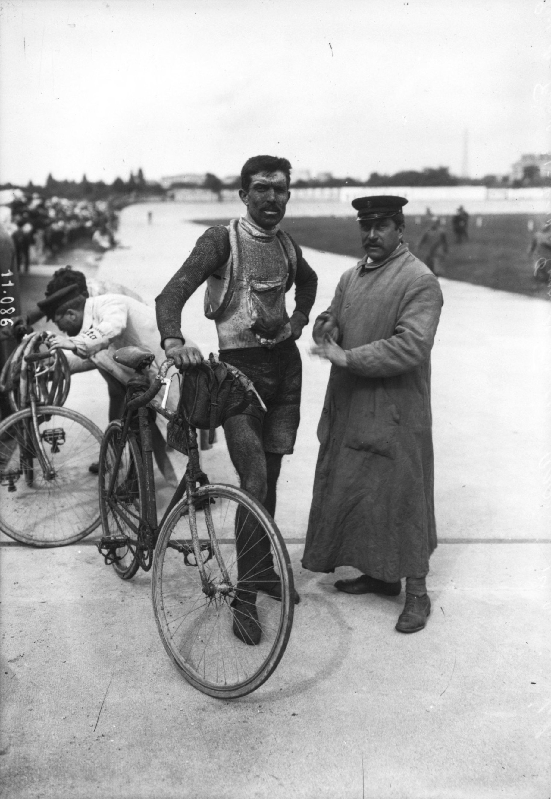 Ernesto Azzini à l'arrivée du Tour de France 1910